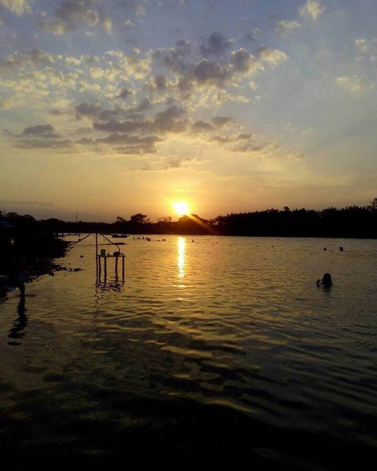 Atardecer en el Río Tesechoacán